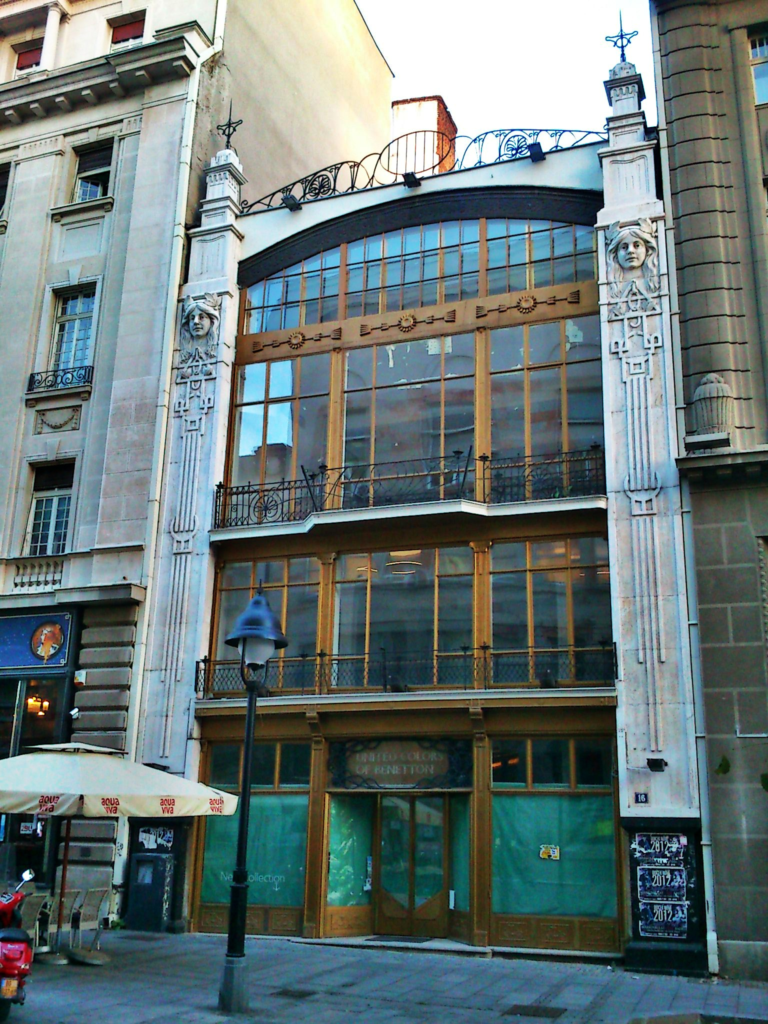 Робни магазин